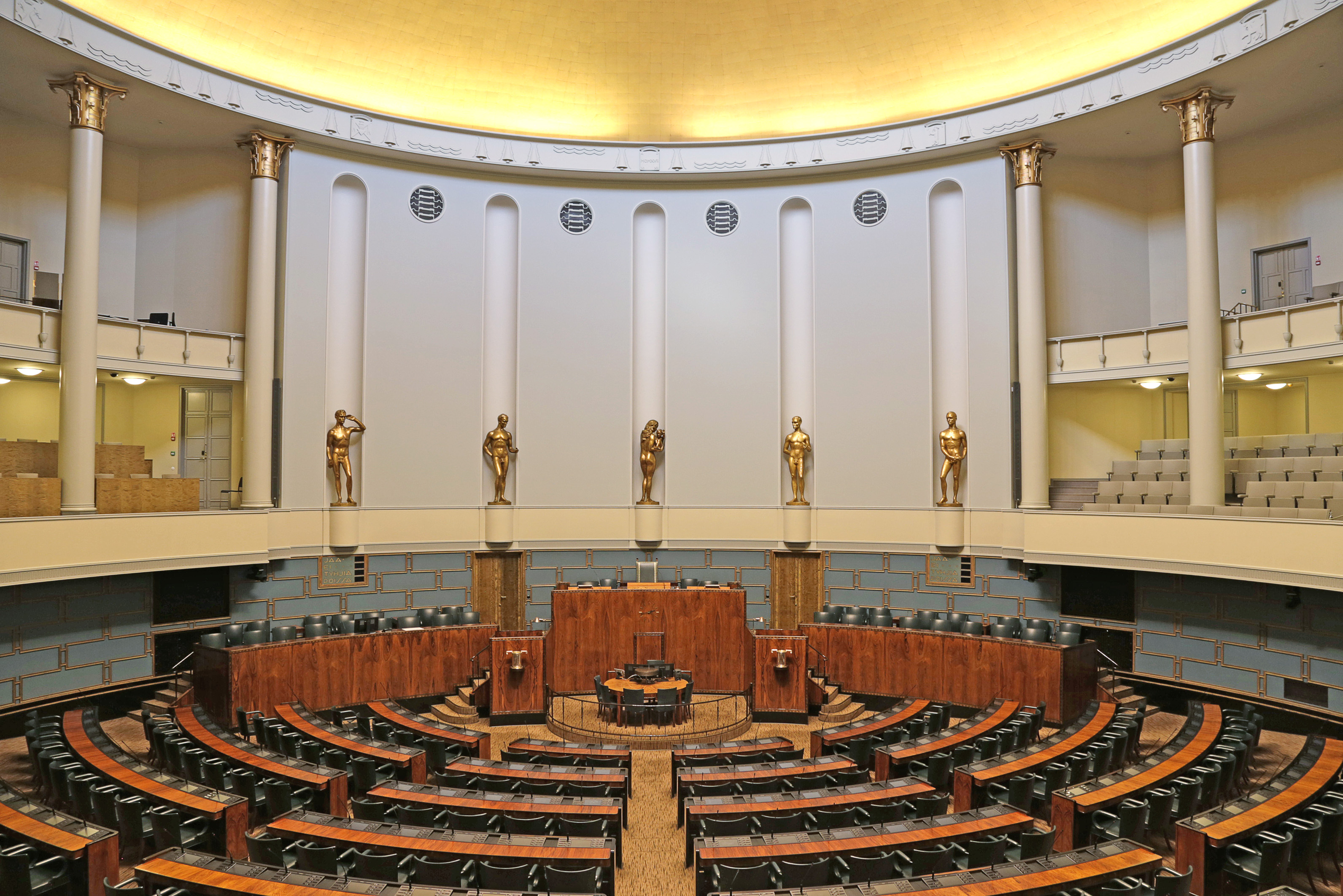 Eduskuntatalon istuntosali peruskorjauksen jälkeen vuonna 2017.